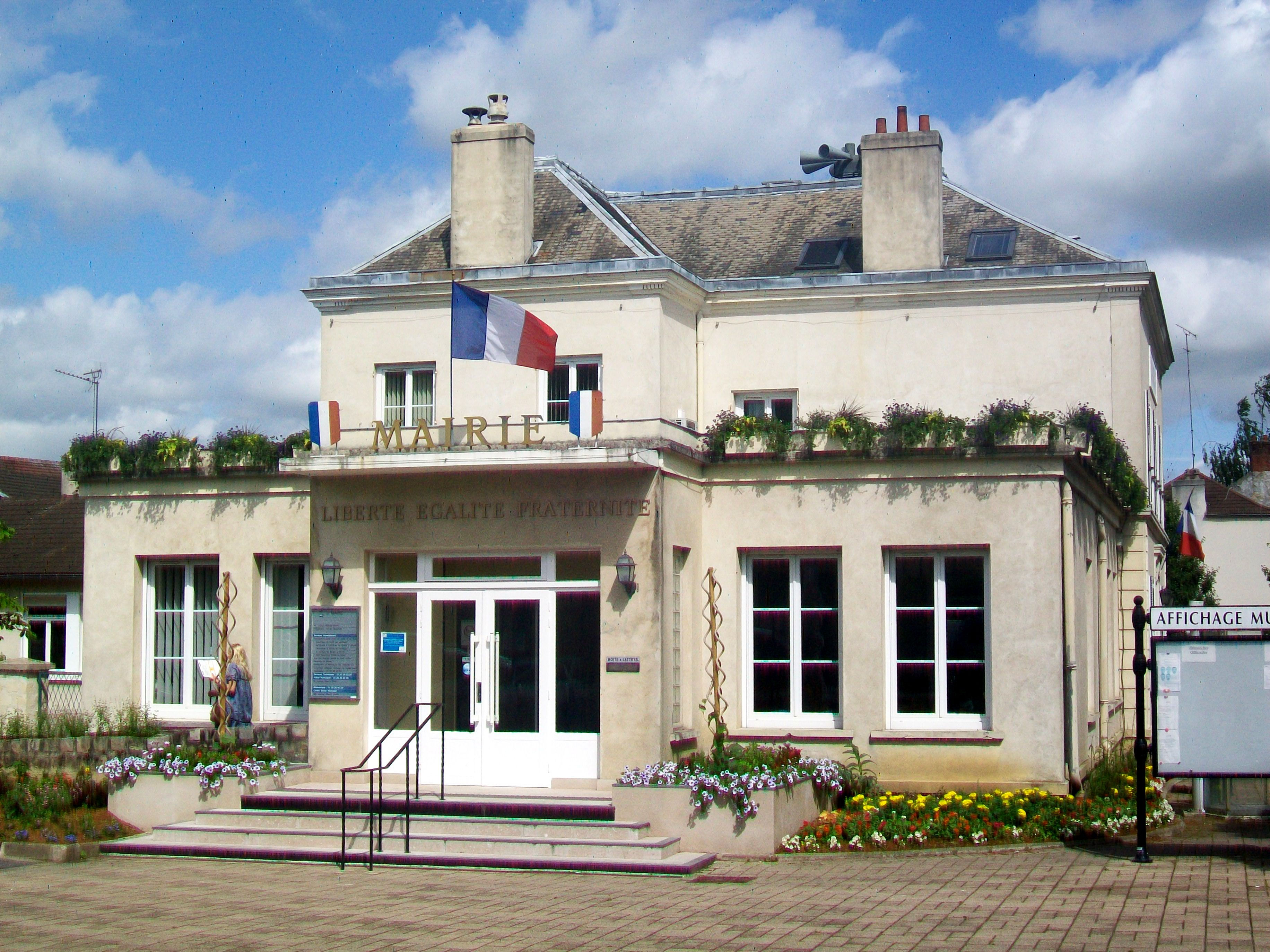 Mairie de Méry-sur-Oise, façade sud-est sur le parking.